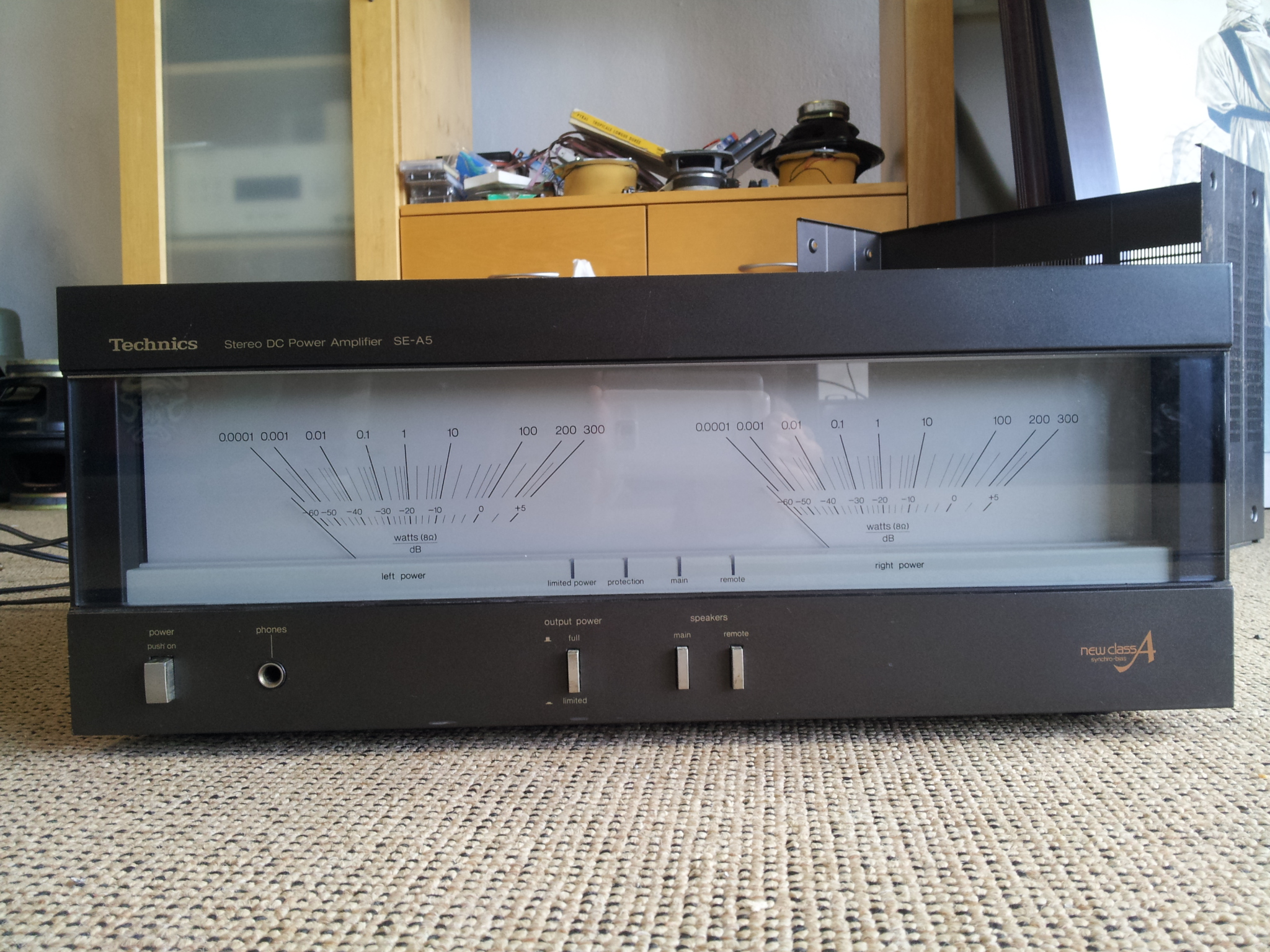 Technics Power